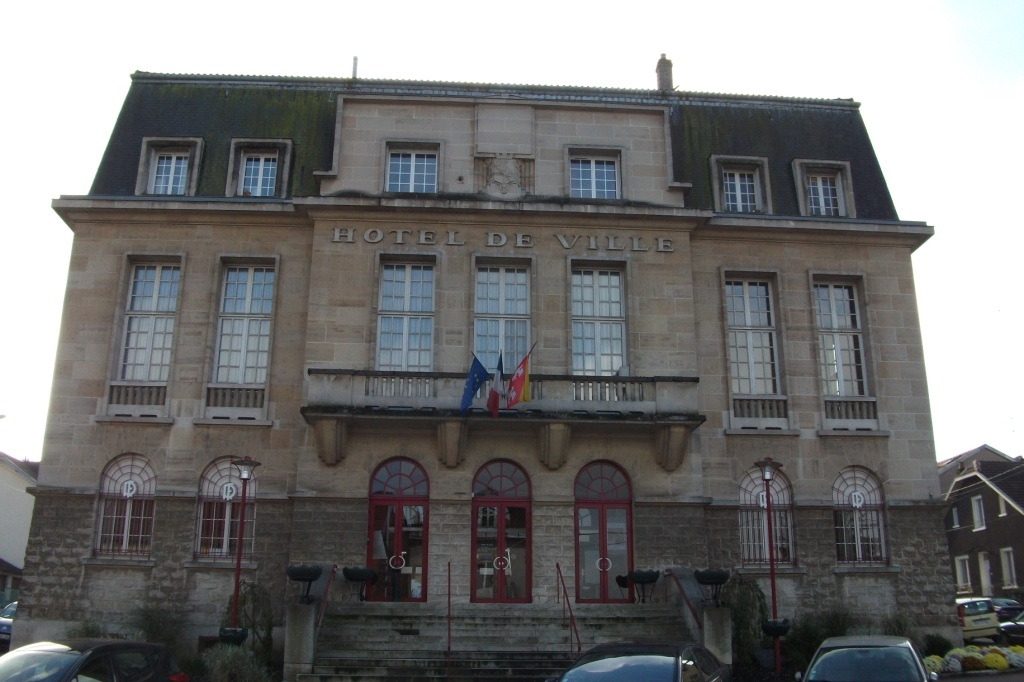 Frouard, l'hôtel de ville.